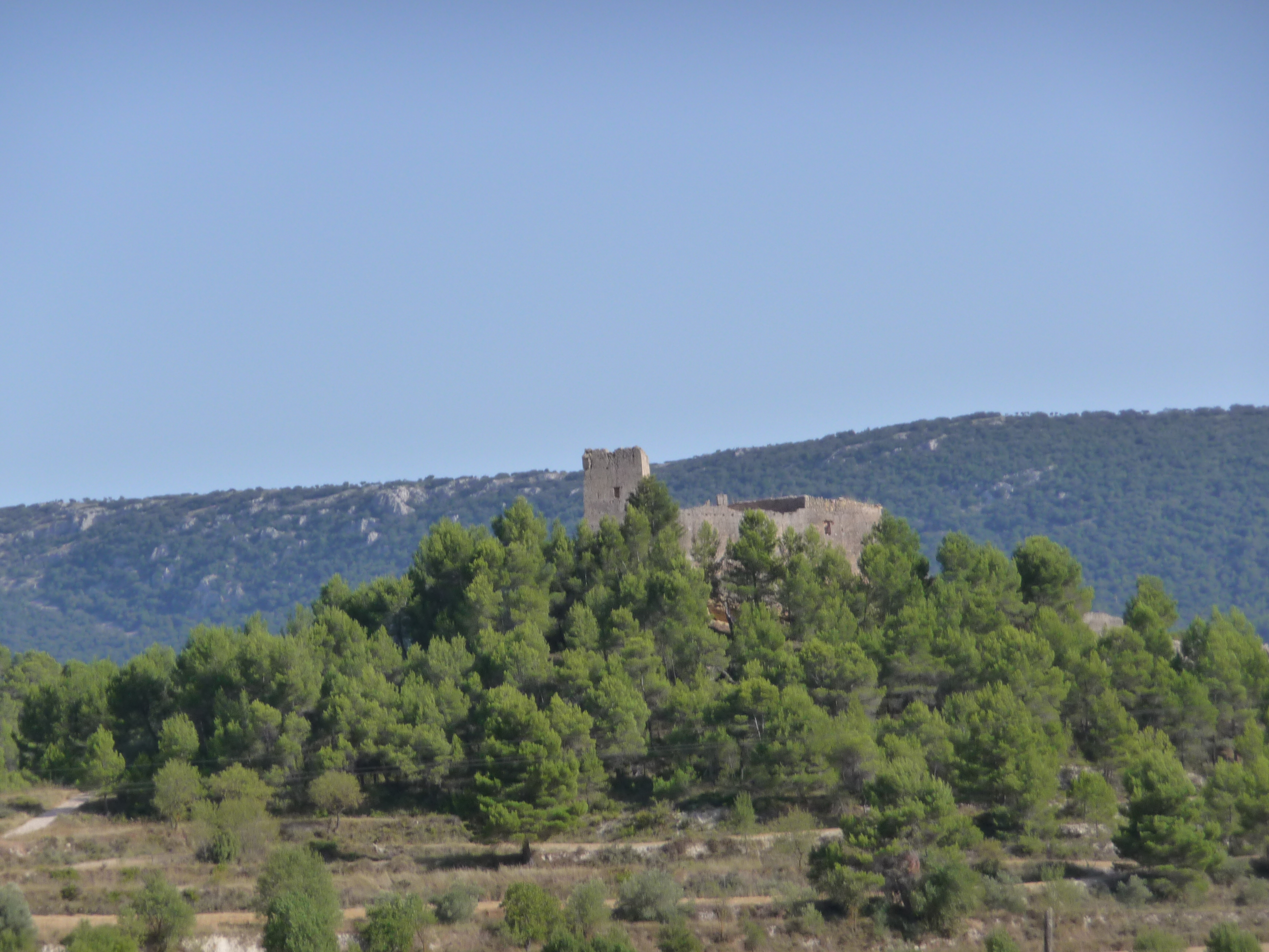 Vista general del castell de Barxell (Alcoi)